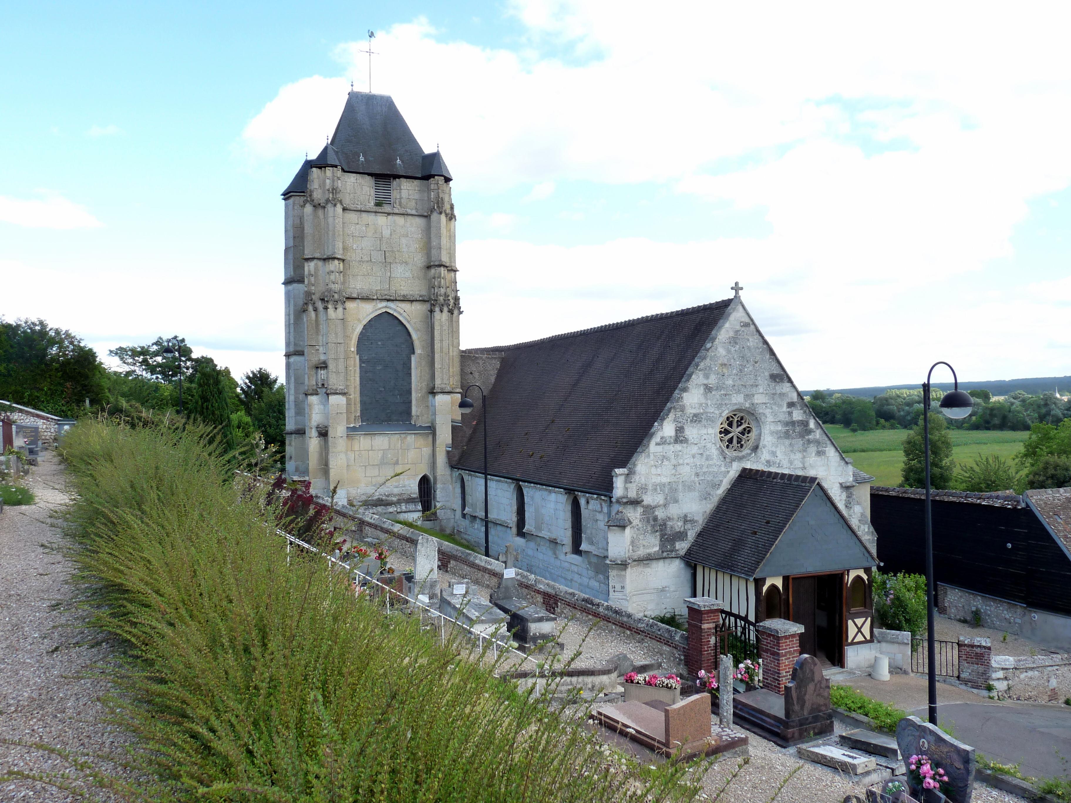 Église Notre-Dame de Freneuse (Inscrit) .